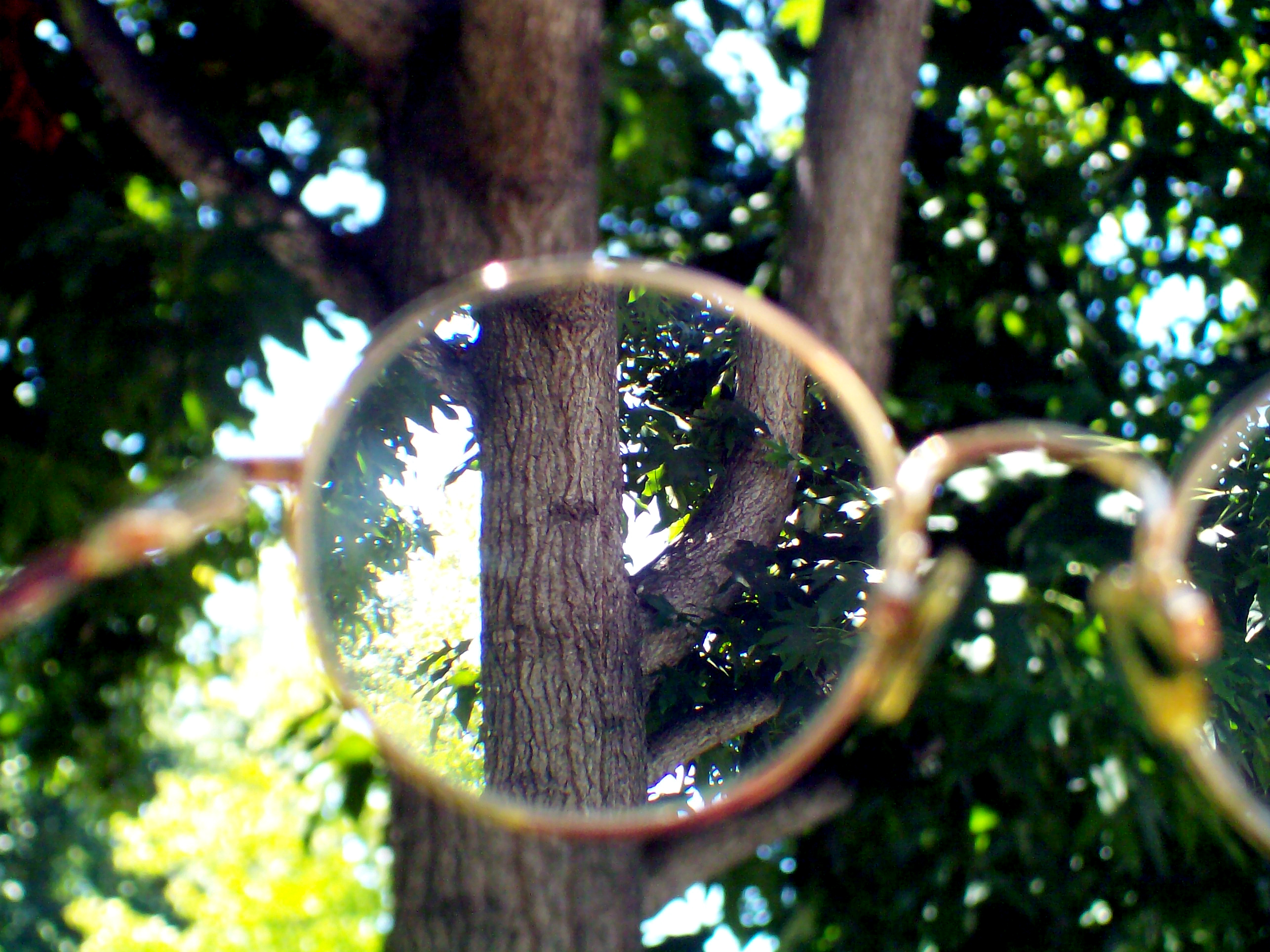 намален образ през очила за късогледство